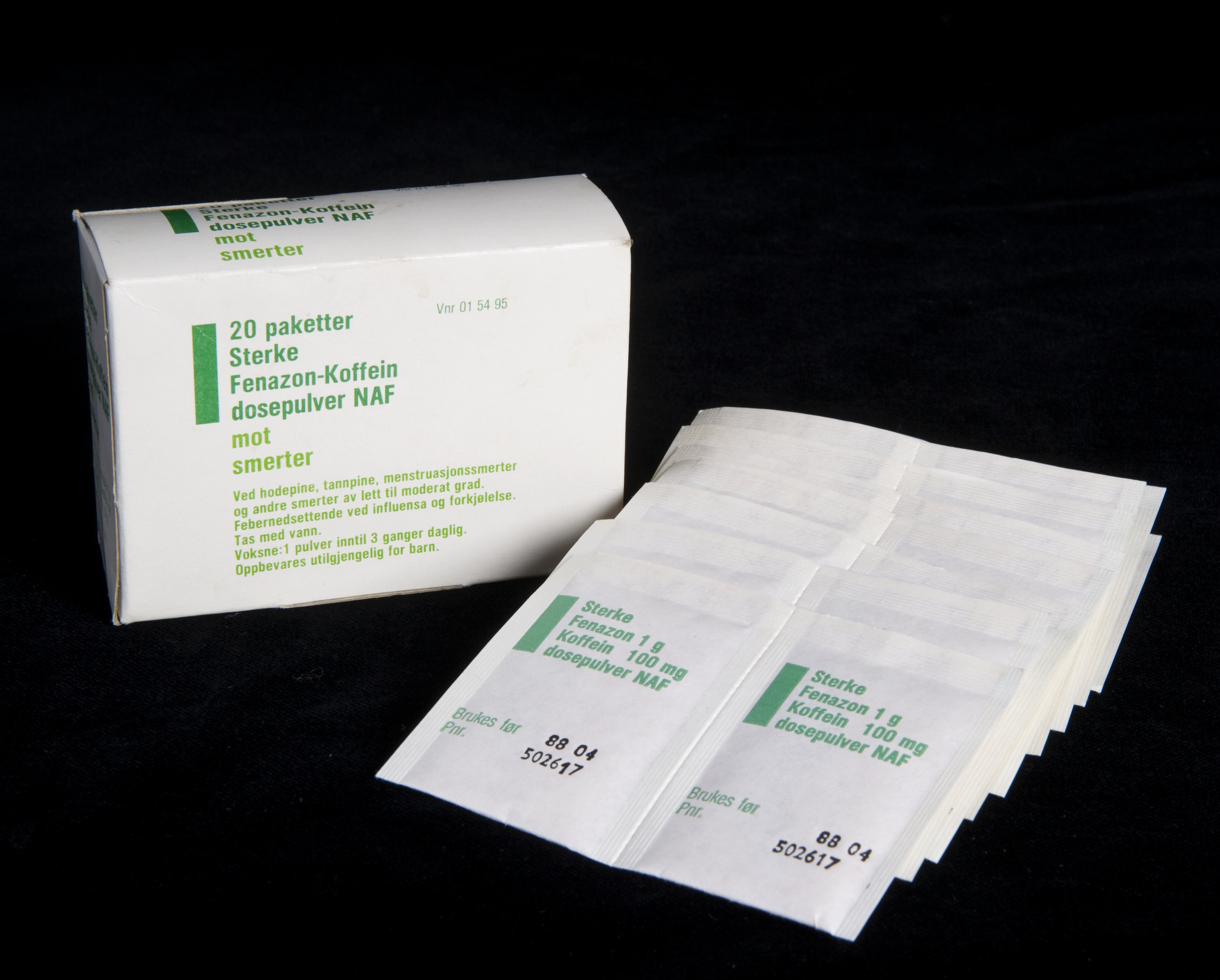 Eske med apotekfremstilte dosepulver. Sterke Fenazon-Koffein dosepulver.